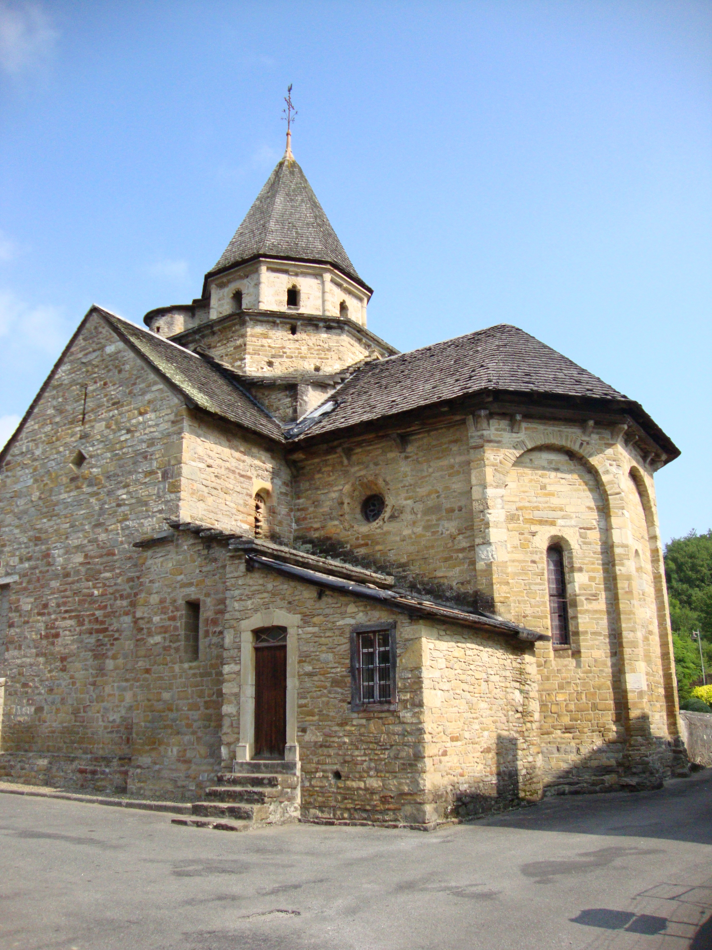 L'Hôpital-Saint-Blaise (Pyr-Atl, Fr) L'église, coté approx. sud